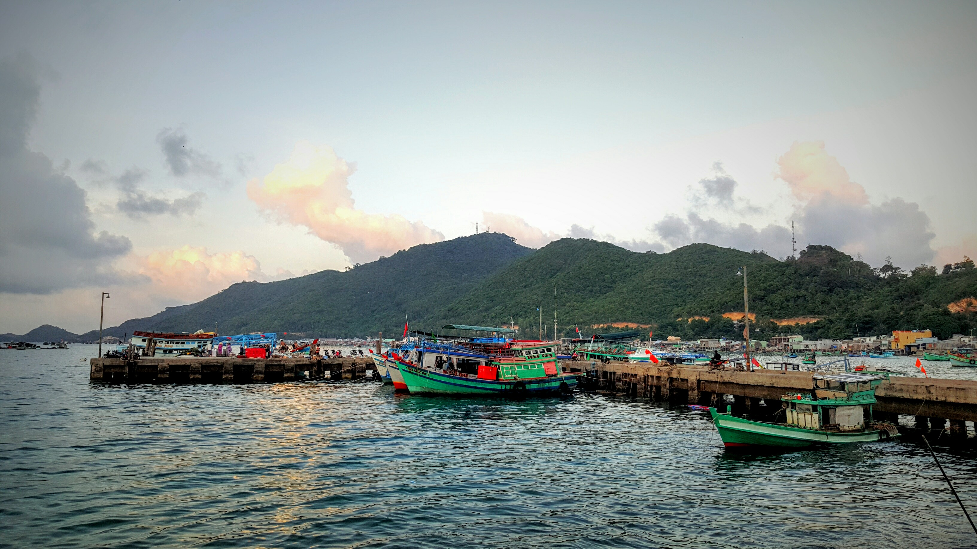 Cau cang Dao cu tron-quan Dao nam du. xa An Sơn, Huyen Kiên Hải, tỉnh Kiên Giang, Việt Nam,02/07/16/Dyt